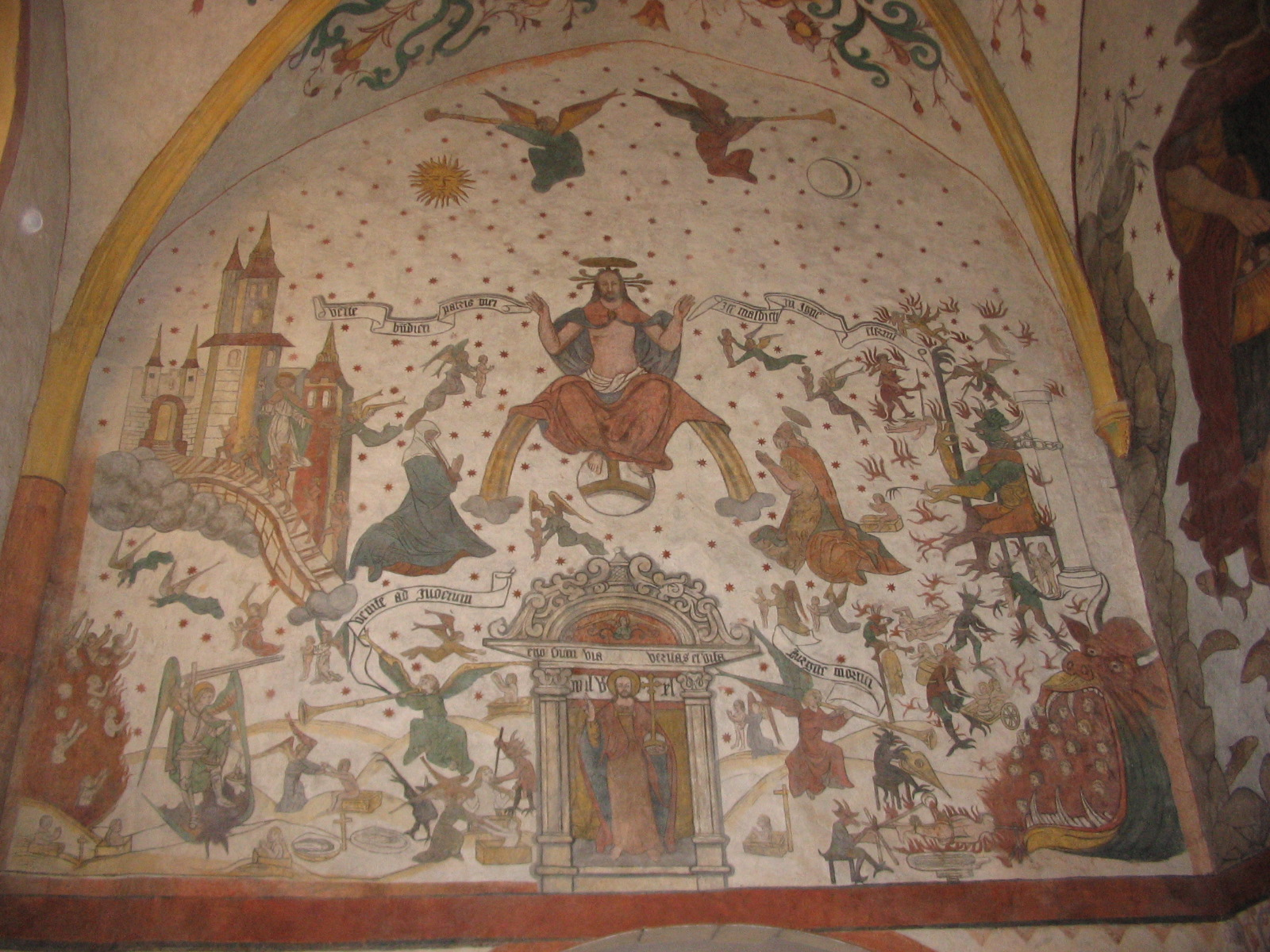 Fresque de l'église de Sillegny (57)